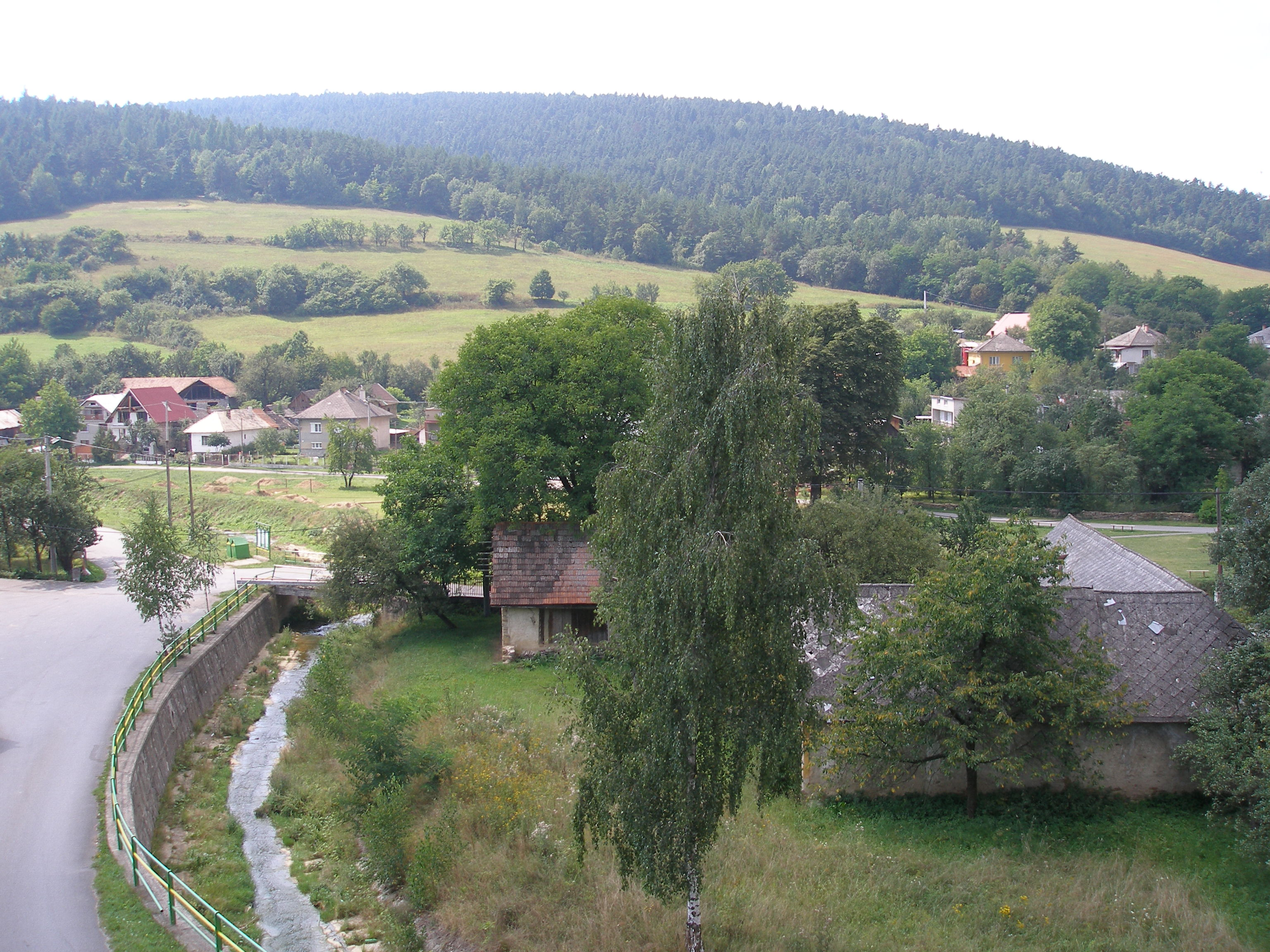 Šarišská obec Bertotovce